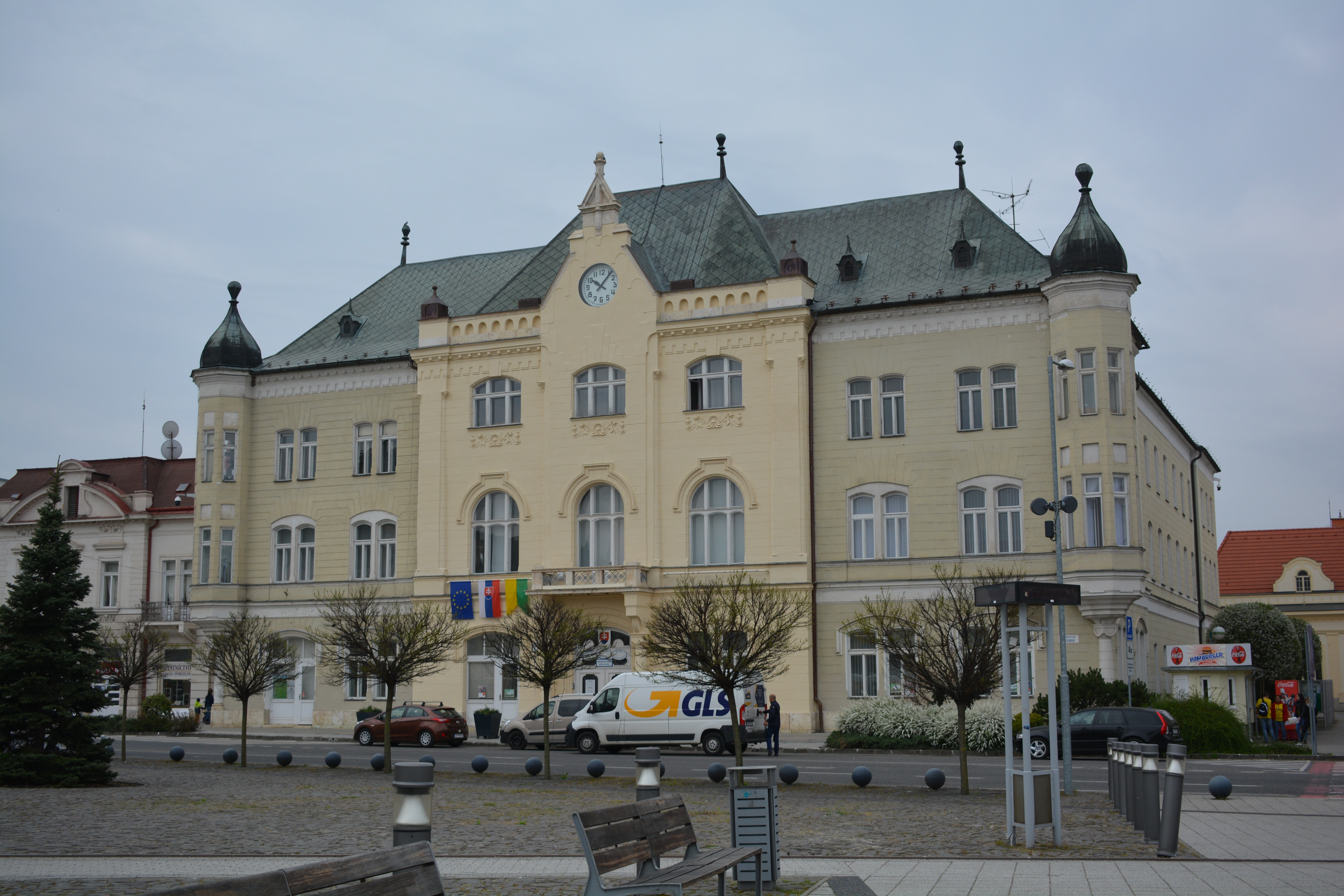 Levice-radnica